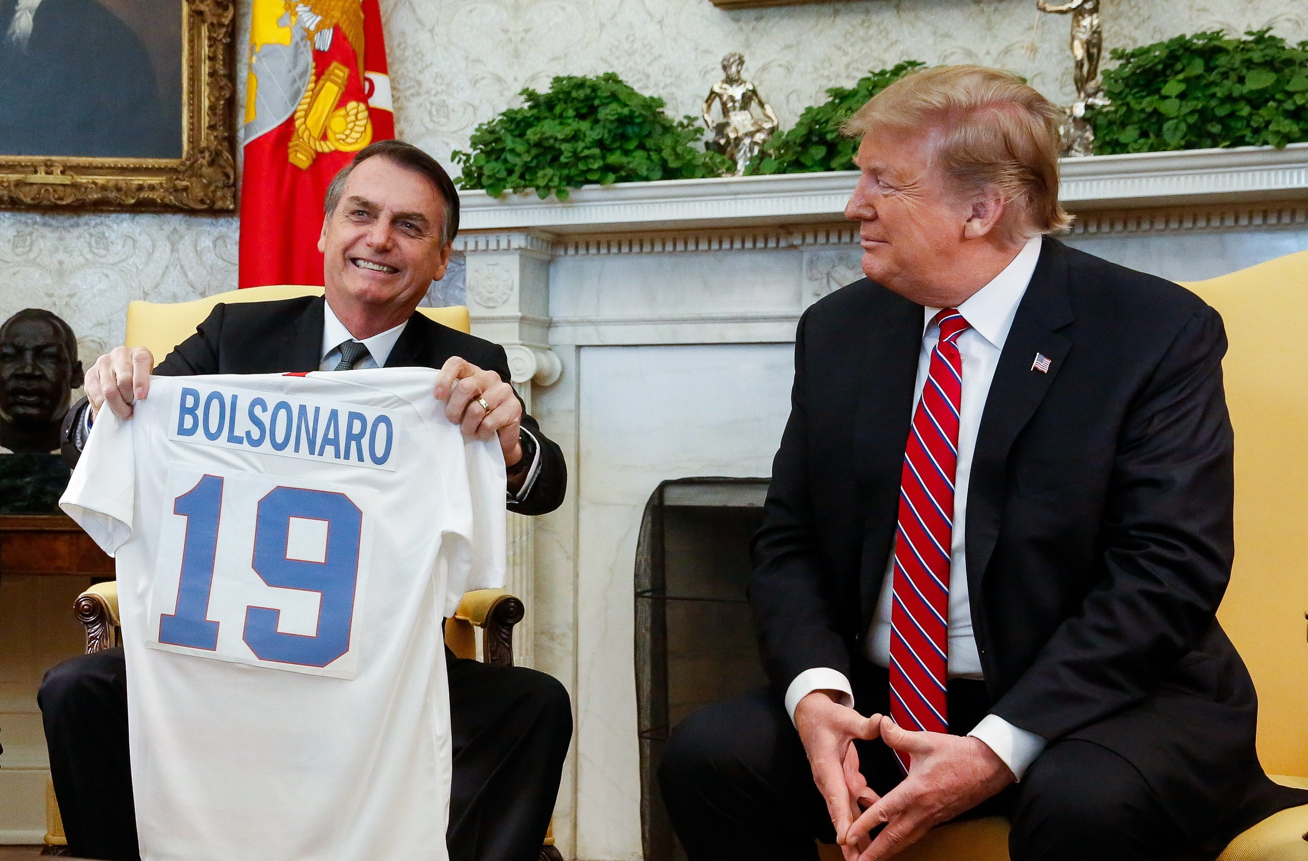 (Washington, DC - EUA 19/03/2019) O Senhor Donald Trump, Presidente dos Estados Unidos da América, entrega uma camisa personalizada, simbolizando o esporte nacional, ao Presidente da República Jair Bolsonaro. Foto: Isac Nóbrega/PR